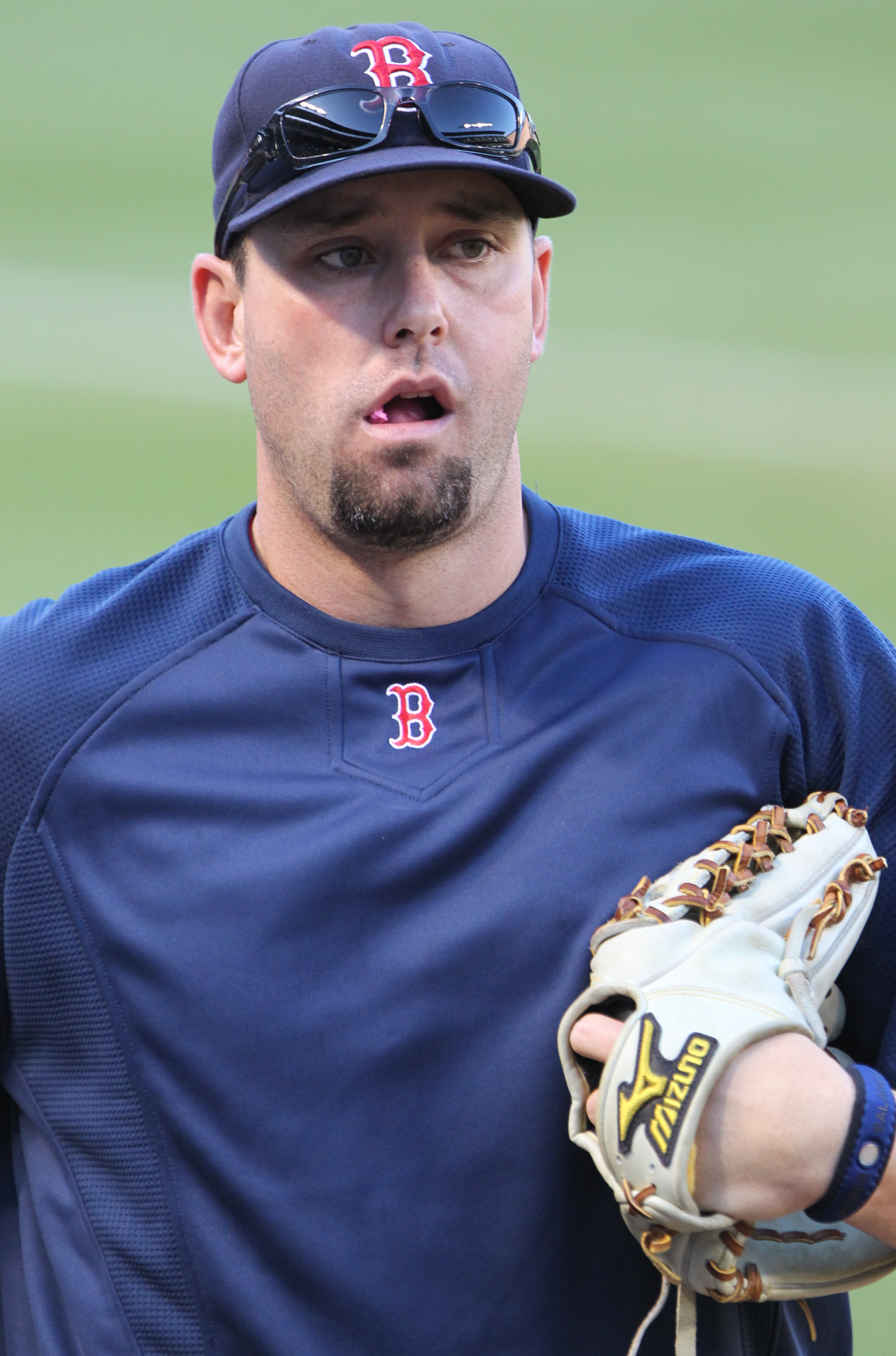 Dan Wheeler